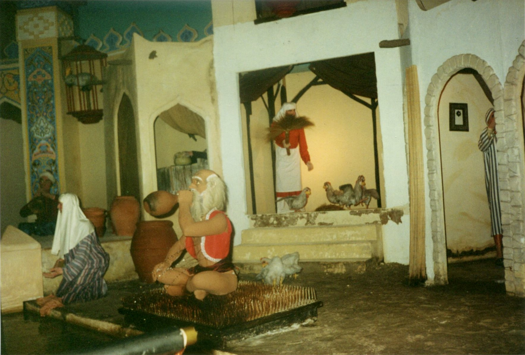 WalibiAlibaba